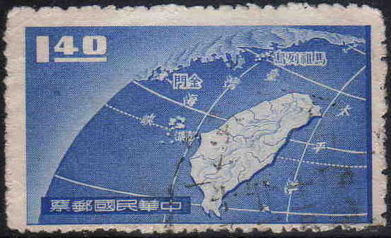 台湾の中華郵政が発行した「保衛金馬郵票」。これは中華人民共和国から金門島と馬祖列島を防衛したことに対する記念切手である。